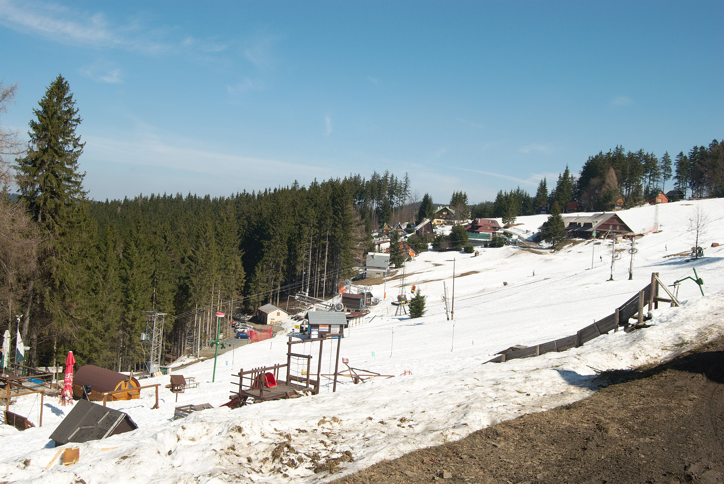 Makov (SK) - osada Kasárne